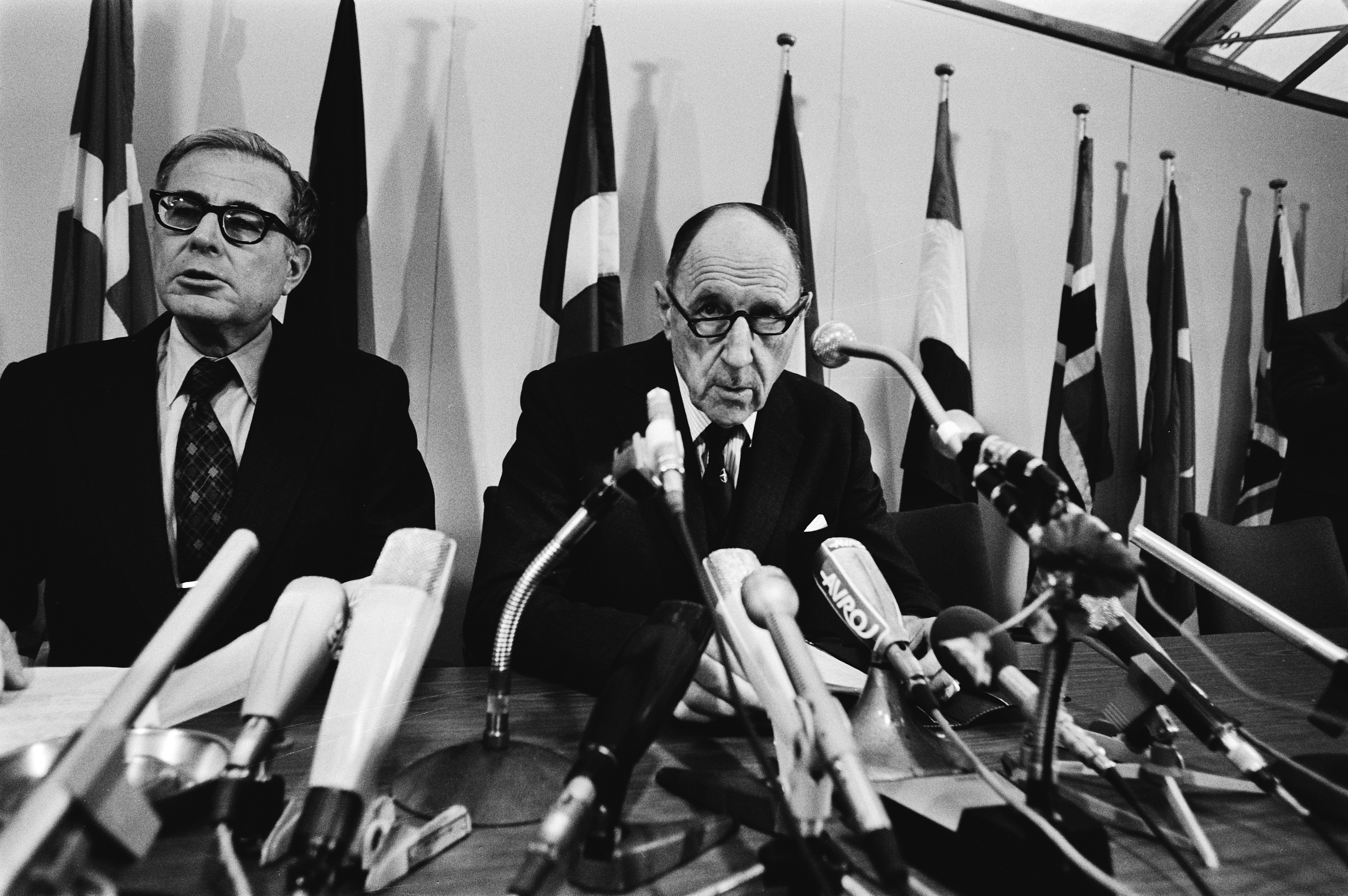 Collectie / Archief : Fotocollectie Anefo Reportage / Serie : Persconferentie na NATO overleg in Den Haag van NATO Beschrijving : Harold Brown (l) en Joseph Luns Datum : 14 november 1979 Locatie : Den Haag, Zuid-Holland Trefwoorden : ministers, persconferenties, voorzitters Persoonsnaam : Harold Brown, Luns, Joseph Instellingsnaam : NAVO Fotograaf : Croes, Rob C. / Anefo Auteursrechthebbende : Nationaal Archief Materiaalsoort : Negatief (zwart/wit) Nummer archiefinventaris : bekijk toegang 2.24.01.05 Bestanddeelnummer : 930-5408